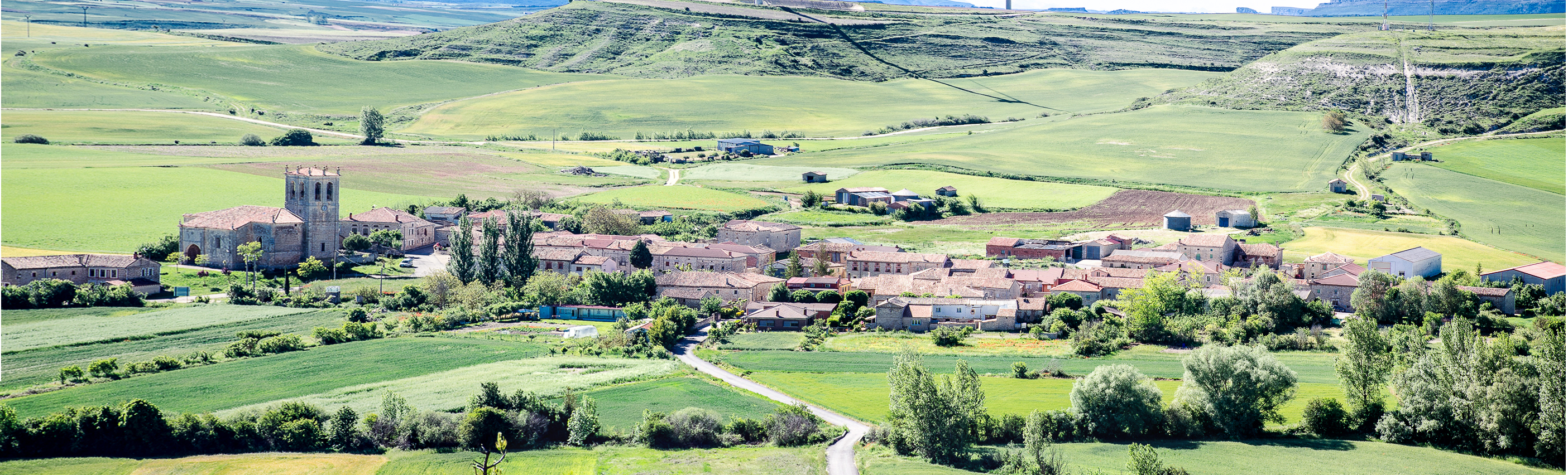 Barrio La Parte, del municipio de Las Hormazas, en Burgos. Imagen del 17 de junio de 2018. Tomada desde el alto de la Ermita del Castillo.